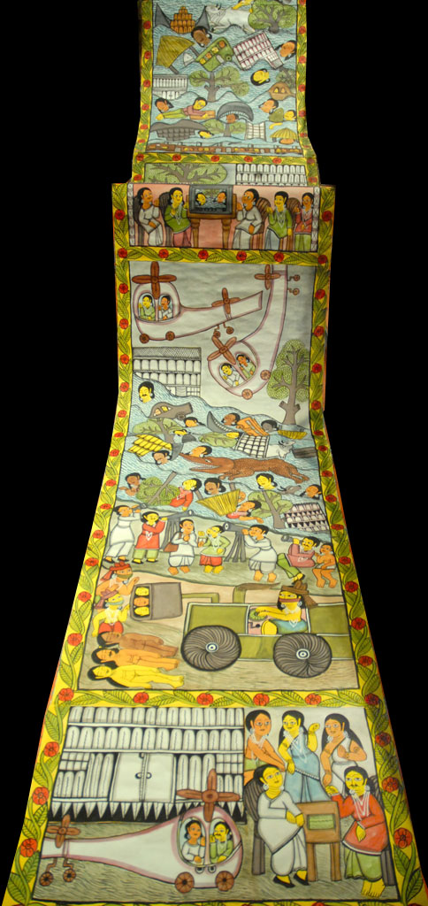 L'exposition "Singing Pictures, art and performance of naya's women" se déroule au musée national d'ethnologie de Lisbonne du 5 juillet au 31 décembre 2007. le site du musée national d'ethnologie le site sur les peintures des femmes Naya